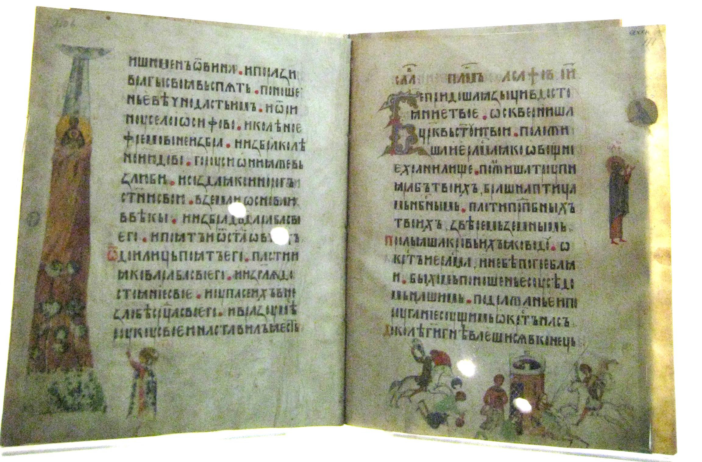 КИЕВСКАЯ ПСАЛТИРЬ Писец протодиакон Спиридон 1397 год 230 л. Пергамен, бумага; чернила, киноварь, темпера, золото; переплет – дерево, бархат 29,8 х 24,8 Поступила в 1932 году На л. 227 запись писца: В лето 6905 списана бысть книга си Давыда царя повеленьем смиренаго владыкы Михаила рукою грешнаго раба Спиридонья протодиякона, а писана в граде в Киеве Была исполнена в Киеве, с начала XVI века находилась в Литве, а в 1518 году вложена в Никольскую церковь города Вильно. Между 1874 и 1881 годами владельцем рукописи был князь П.П. Вяземский, затем граф С.Д. Шереметьев, который подарил ее в 1881 году Обществу любителей древней письменности Реставрирована в 1963 году в ГПБ РНБ инв. ОЛДП. F. 6